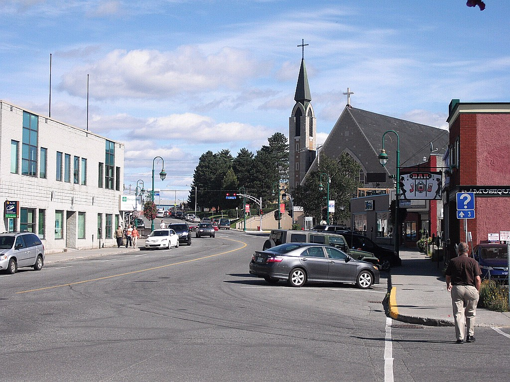 Vue sur Val d'Or, ville de l'Abitibi, Québec, Canada.